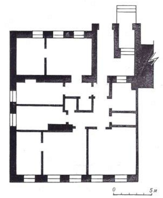 Мінск. План дома па вуліцы Інтэрнацыянальнай, 6